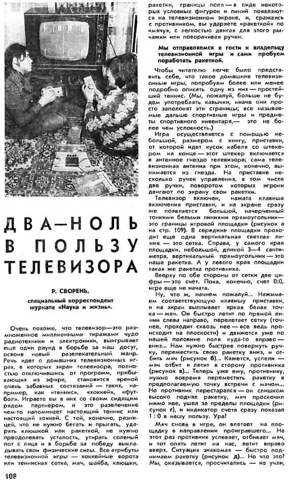 Статья принадлежит сотруднику «Радио», который опубликовал свои впечатления в журнале «Наука и жизнь» (№4/1978). Корреспонденту довелось поиграть в прототип первой советской игровой приставки «Турнир» — практически полной копии Odyssey 200.